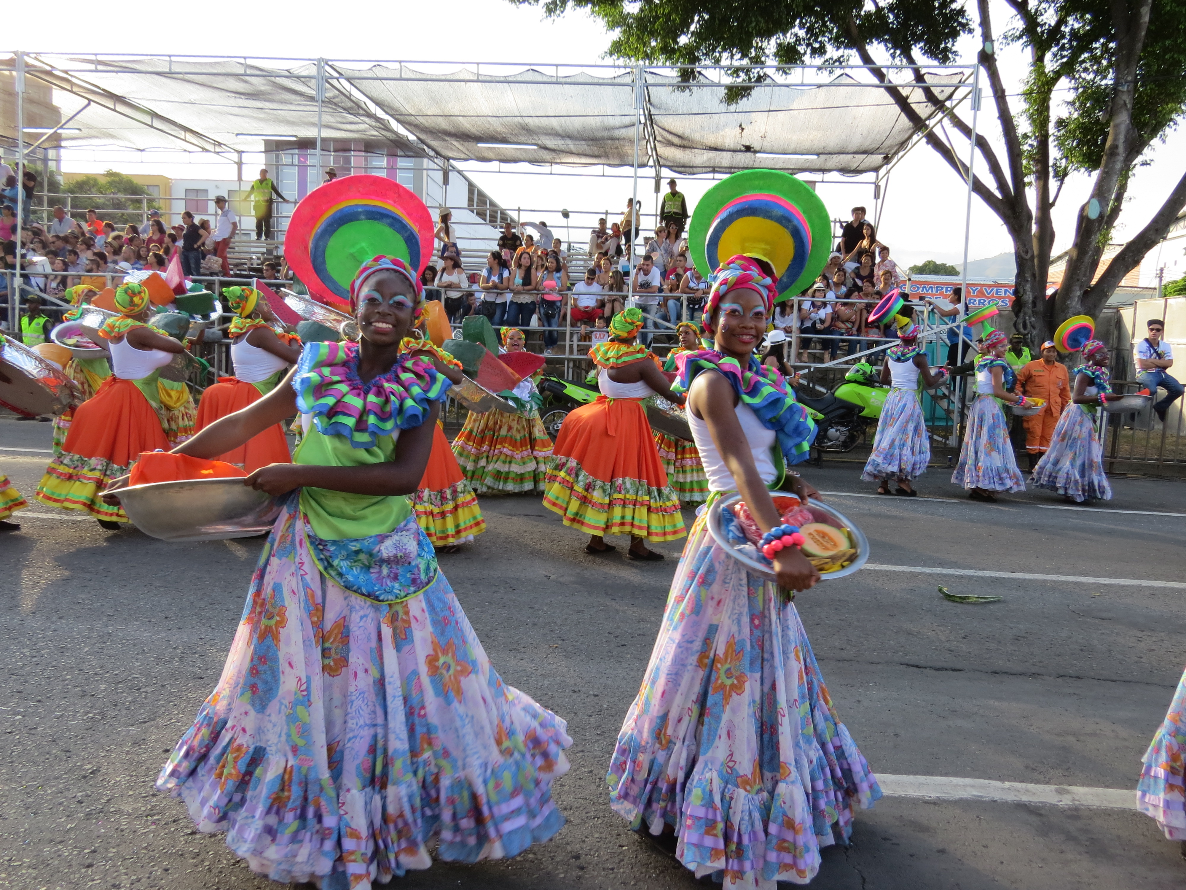 Dentro del hermoso festival que tiene Cali finalizando cada año, se encuentra este hermoso desfile, el cual es adornado con diversas comparsas alusivas a lo más típico de la capital Vallecaucana. EL CARNAVAL DEL CALI VIEJO, tuvo su versión número 58 este año, con grandes influencias del Pacifico Colombiano que representan la identidad de un Caleño Típico. Si estas en Cali en Diciembre, no dudes en asistir a este hermoso desfile lleno de color y alegría.